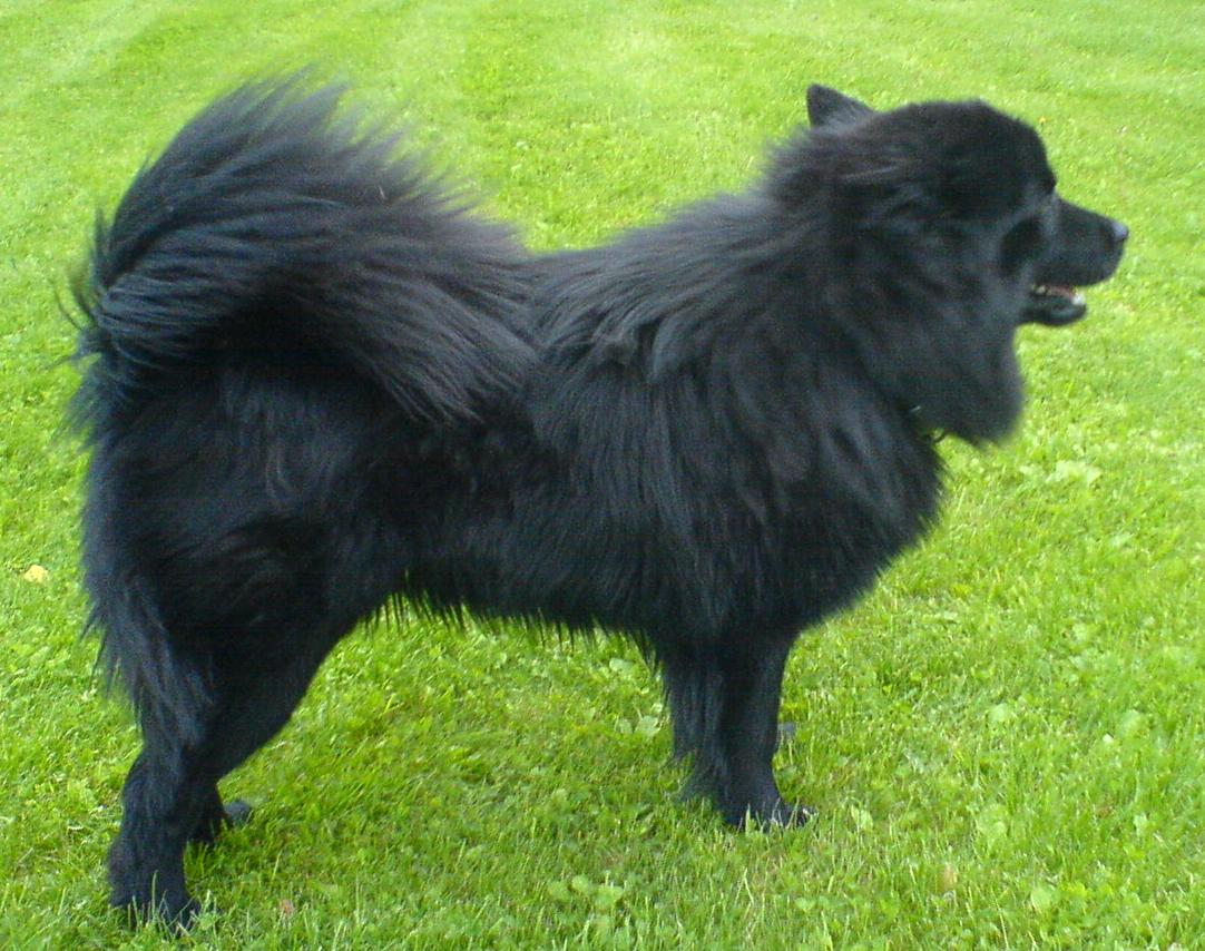 Svenska Lapphund (Swedish Lapphund, Swedish Spetz) «Rufus» (male)